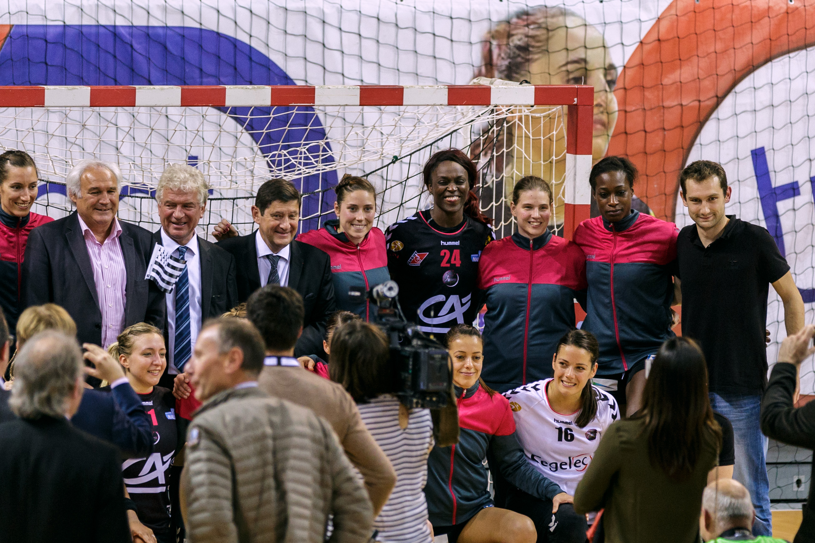 Match de handball du BREST Bretagne Handball à domicile face à Besançon (Entente Sportive Bisontine Féminin) le 16 novembre 2016. La Brest Arena a vu son club l'emporter 24-21.